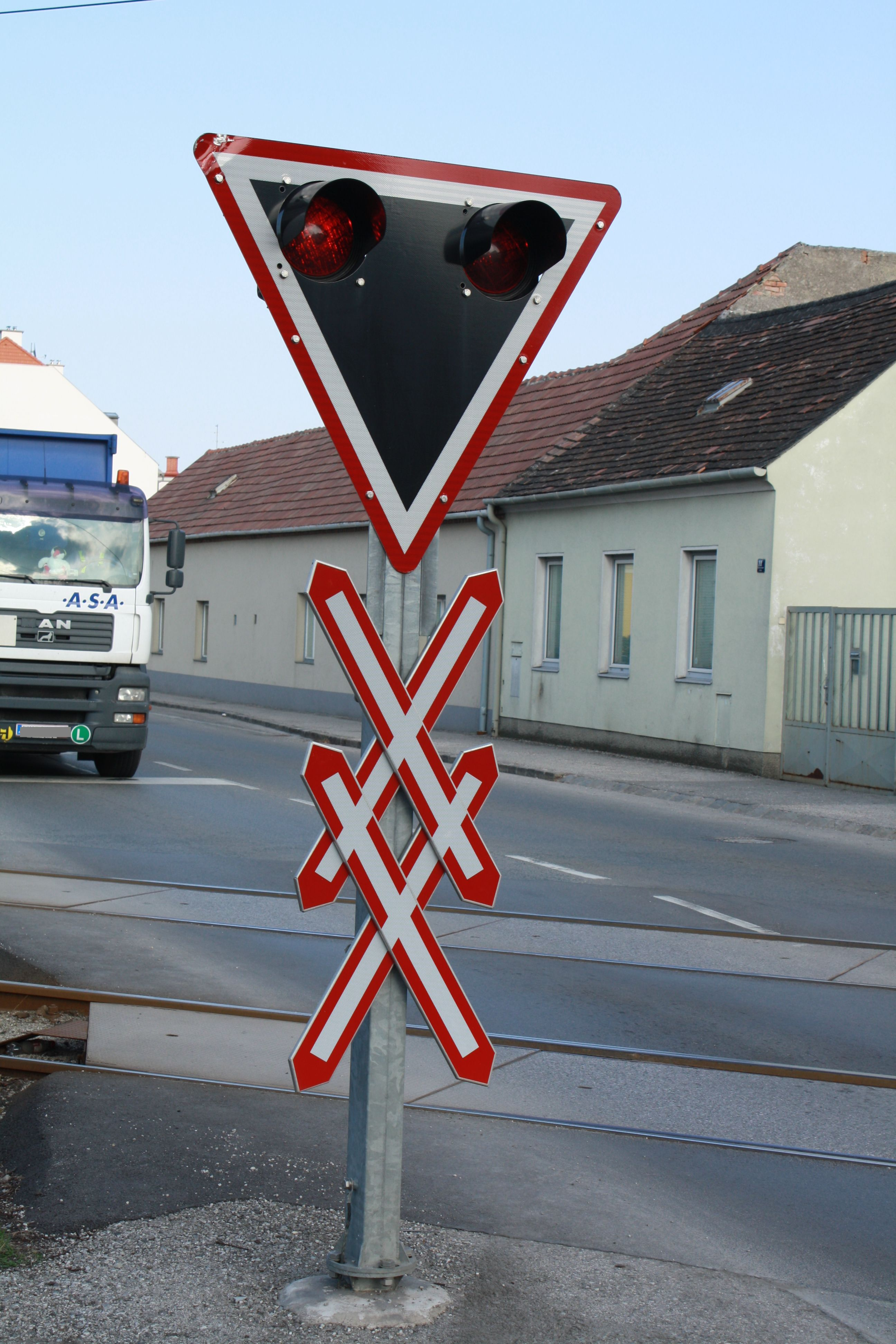 Eisenbahnkreuzung der Badner Bahn in Traiskichen (km 21,521 Pfaffstättner Straße)